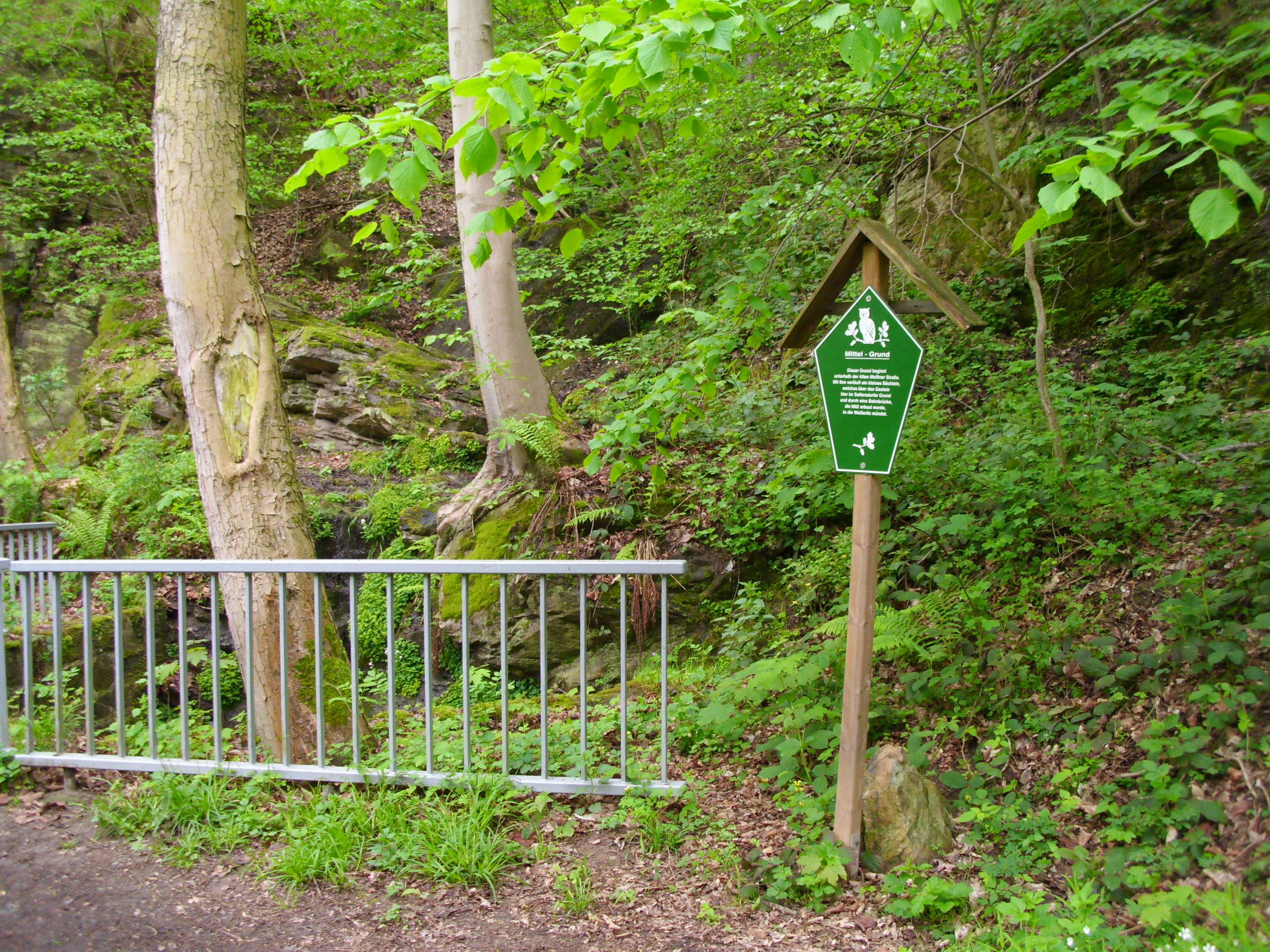 Der Mittelgrund bei Seifersdorf, hier im Seifersdorfer Grund.